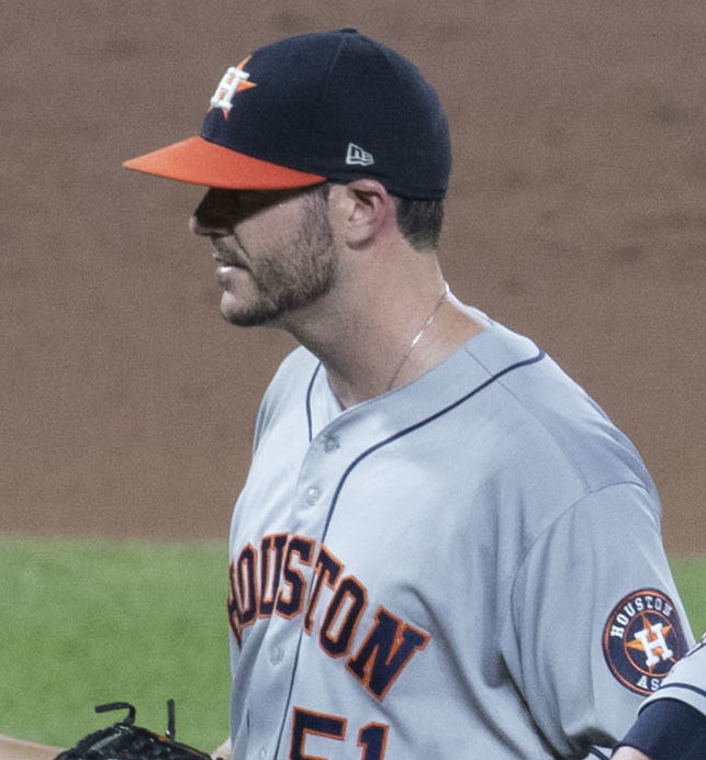 Astros at Orioles 7/21/17